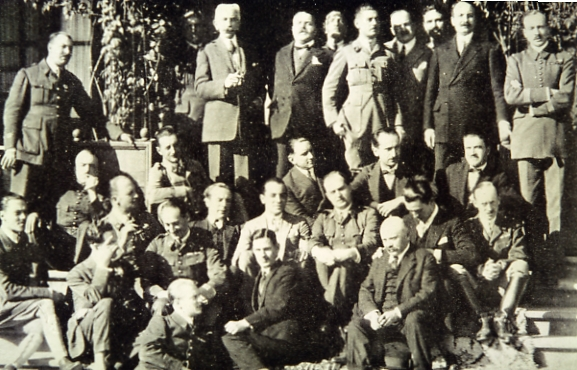 l'équipe du maréchal Lyautey à Rabat en 1925